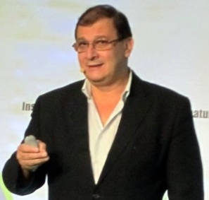 Professor Gilles-Eric Séralini, 4 octobre 2015